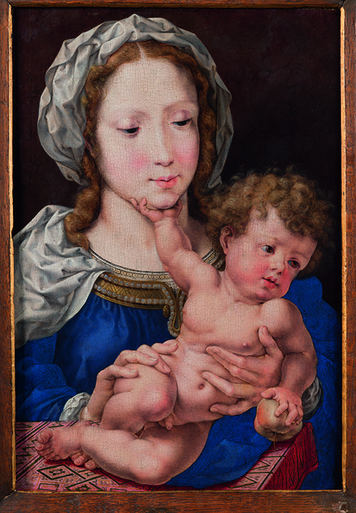 Jan Gossaert, Maria met Kind, 1520, olieverf op paneel, 38 x 25,8 cm.